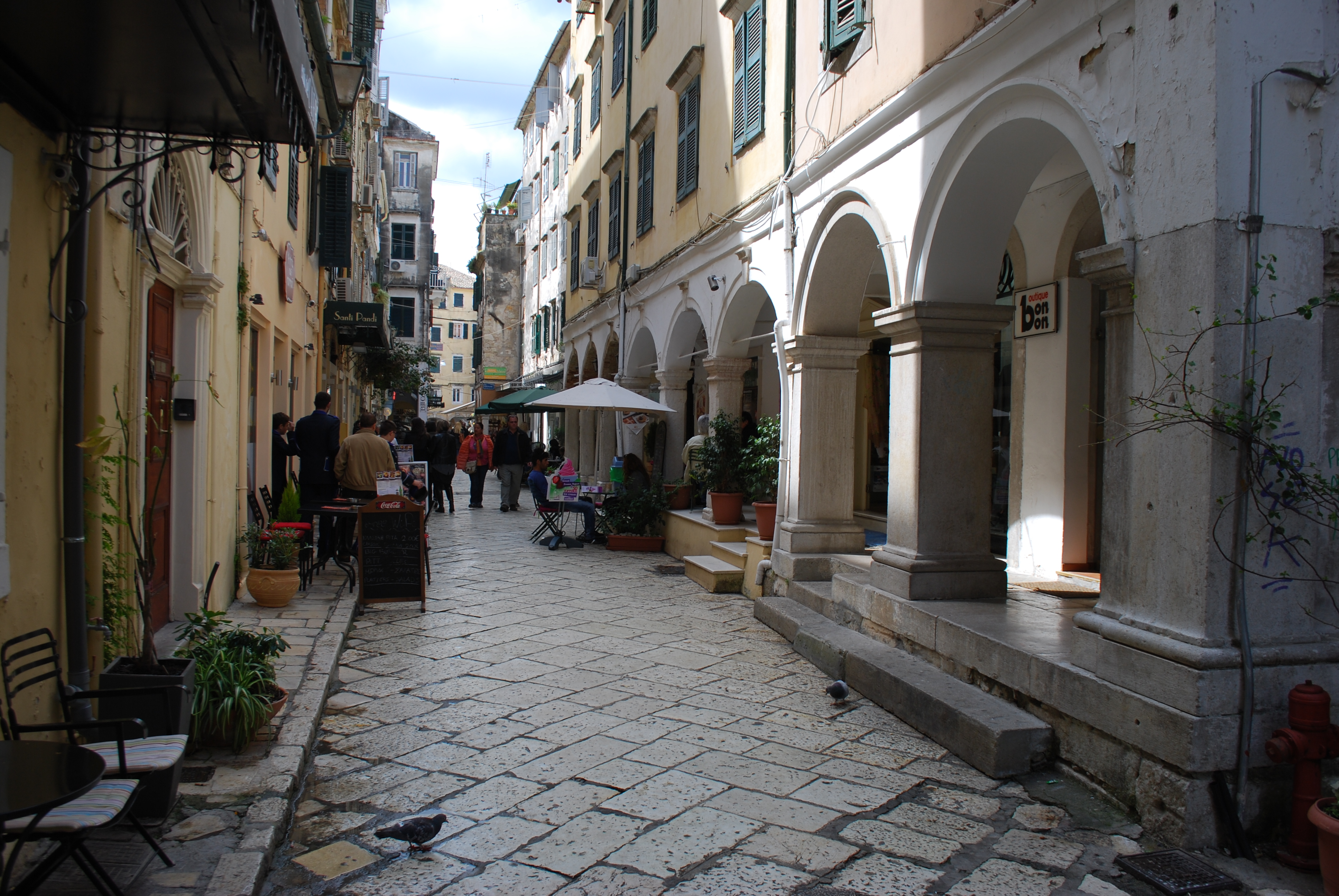 Vue de la ville de Corfou.